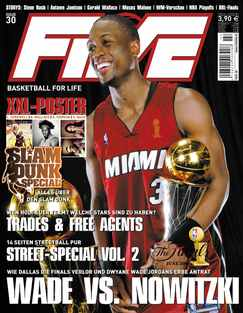 Cover der Zeitschrift Five, Ausgabe 30